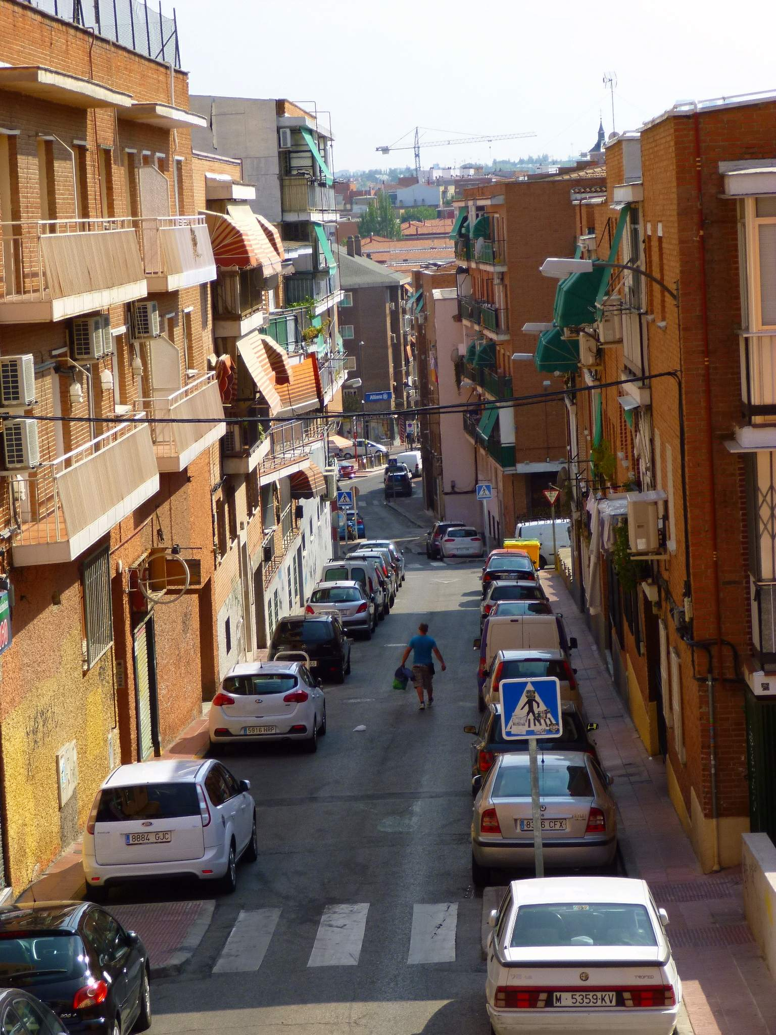 San Sebastián de los Reyes (Madrid)